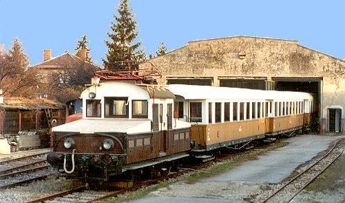 Lokomotive Eg2 mit dazu passenden Waggons